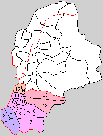 長野県上高井郡の町村。